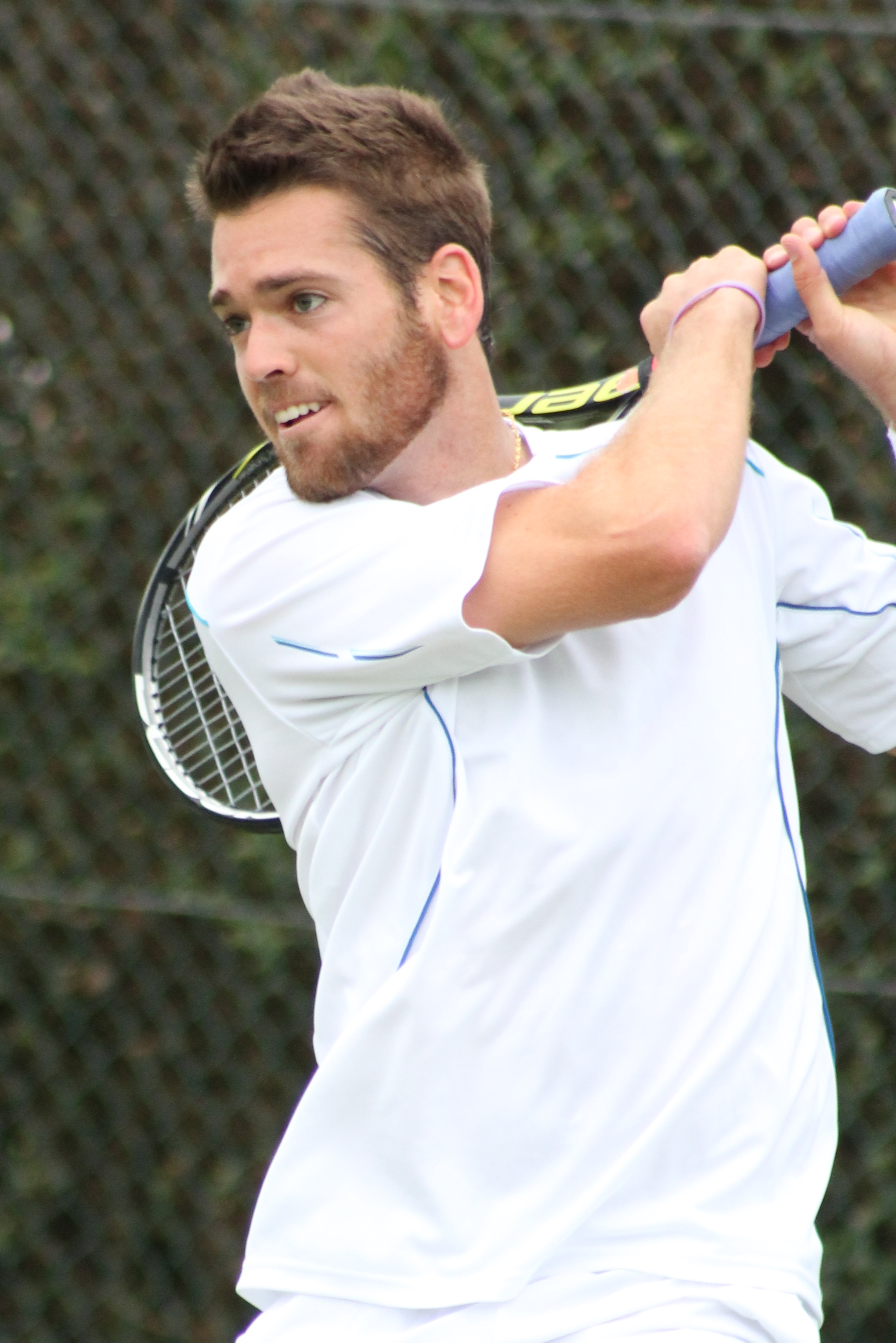 Krajicek A. WMQ14 (1)